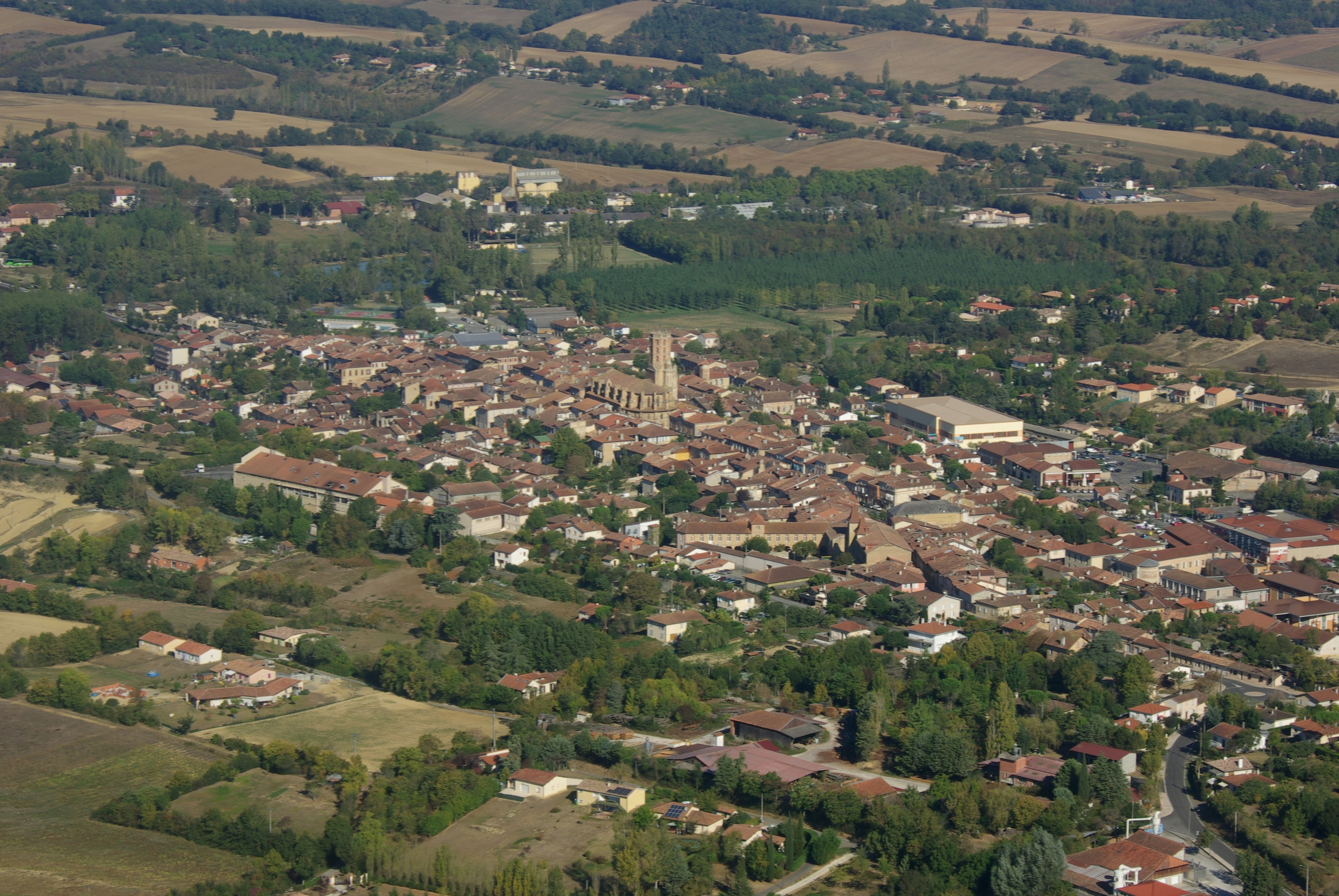 Vue aérienne de Gimont, Gers.